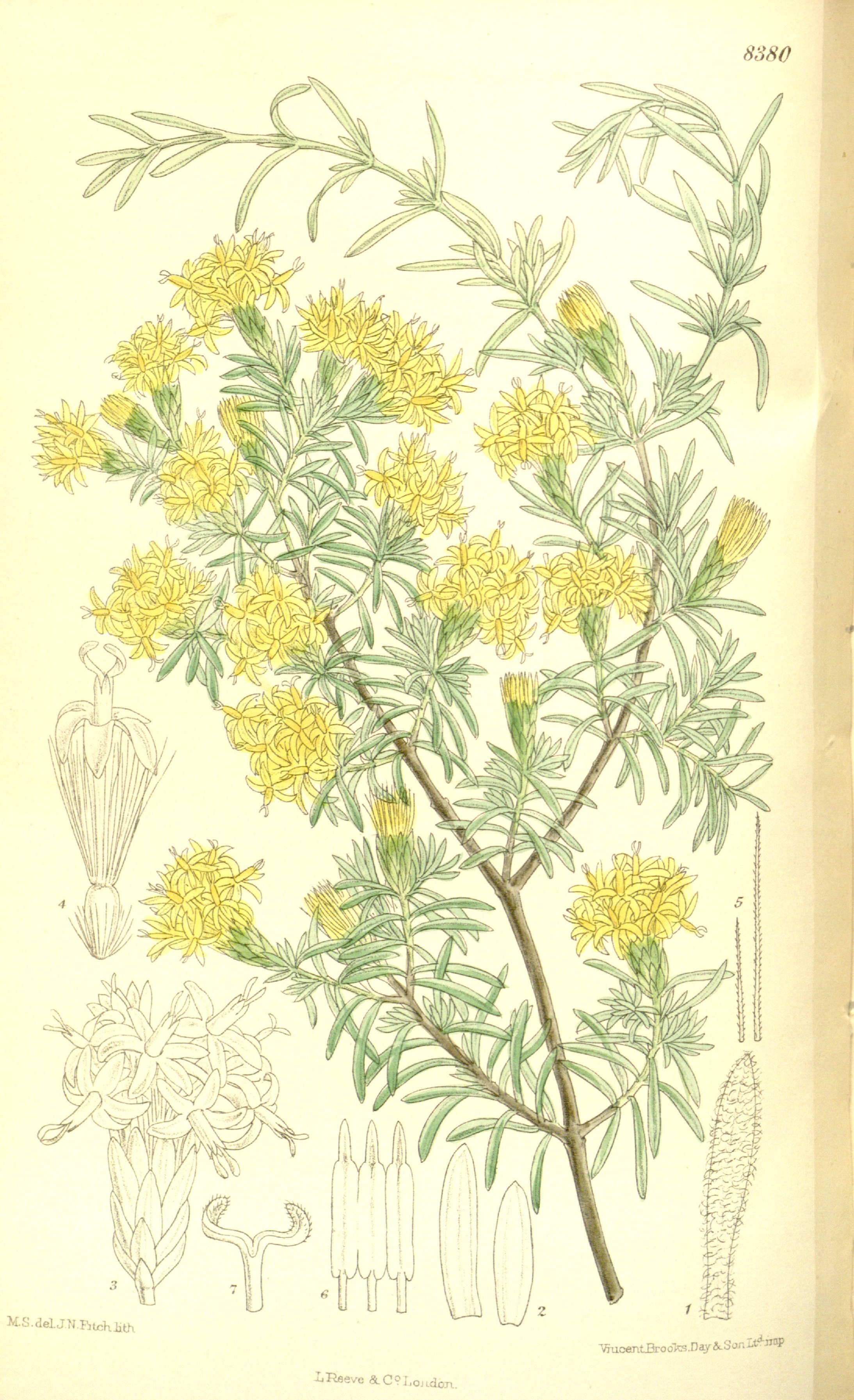 Pteronia incana, Asteraceae